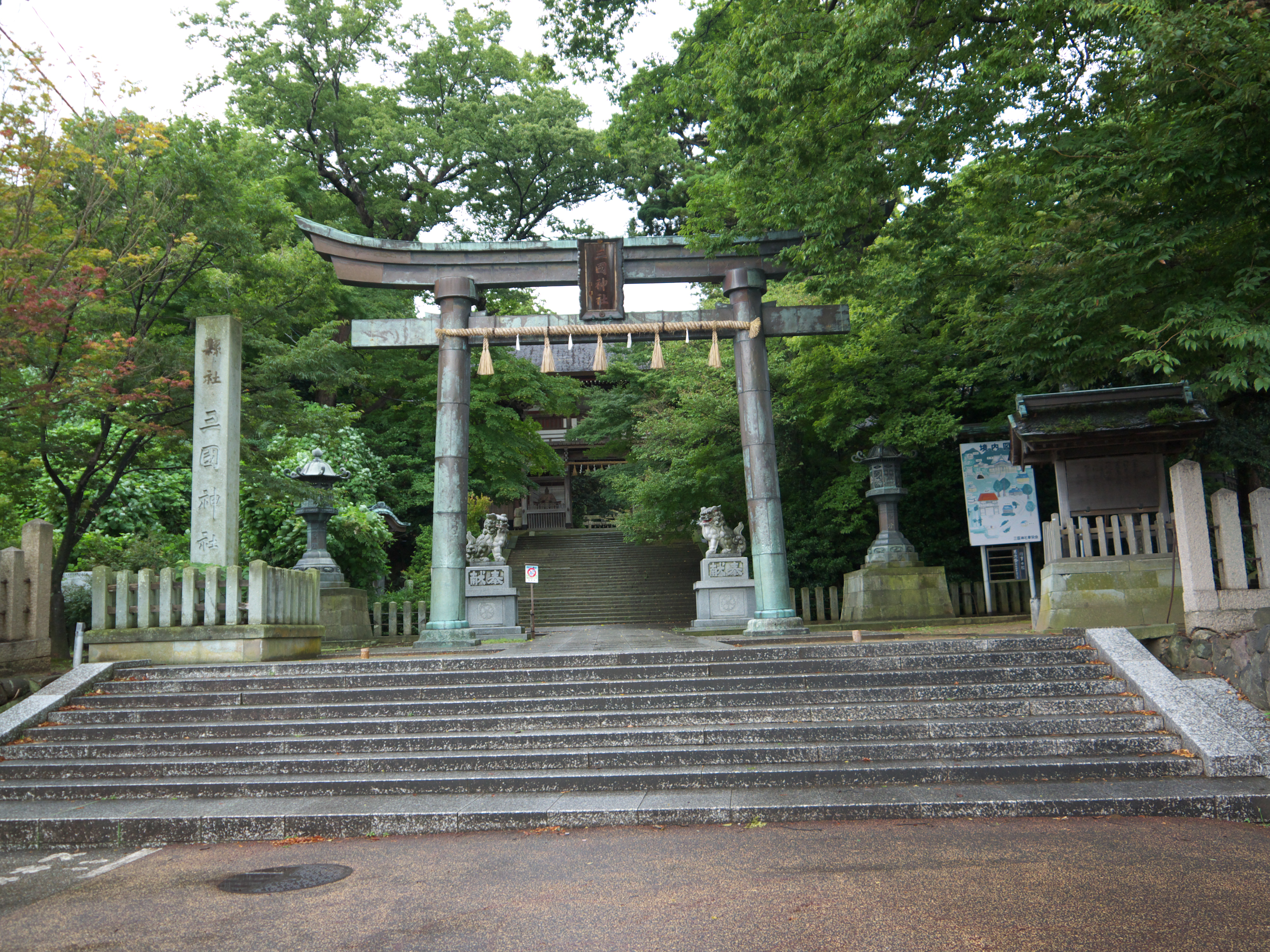 三国神社鳥居